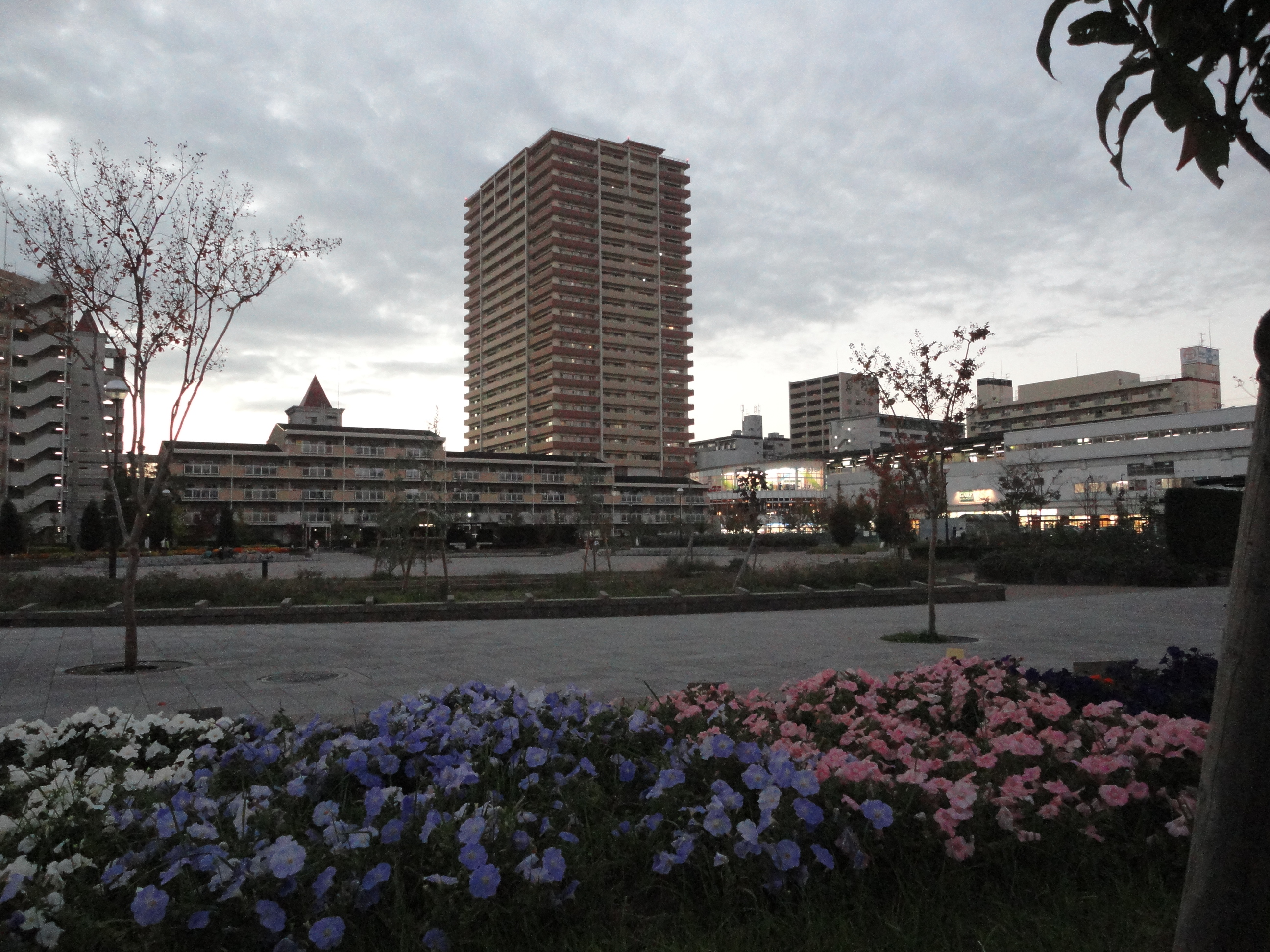 JR学研都市線住道駅の裏にある末広公園を撮影。